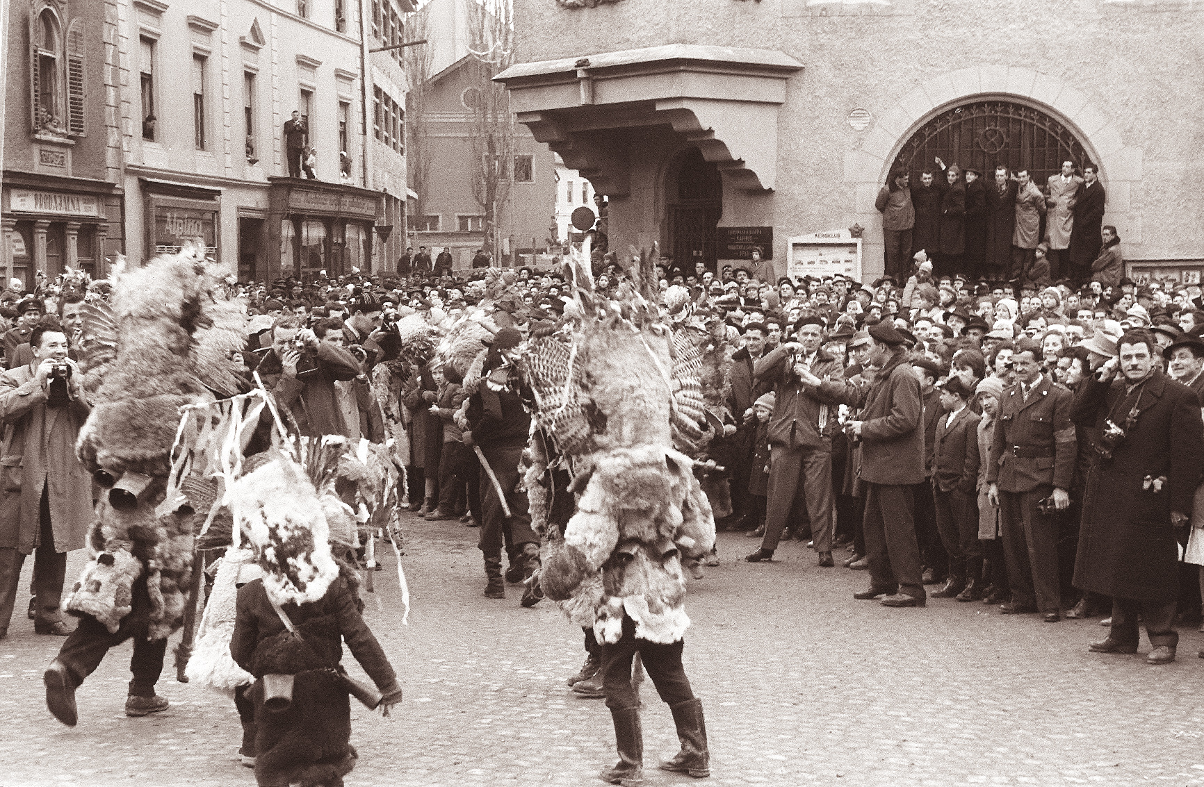 Ptujski pustni karneval in kurentovanje